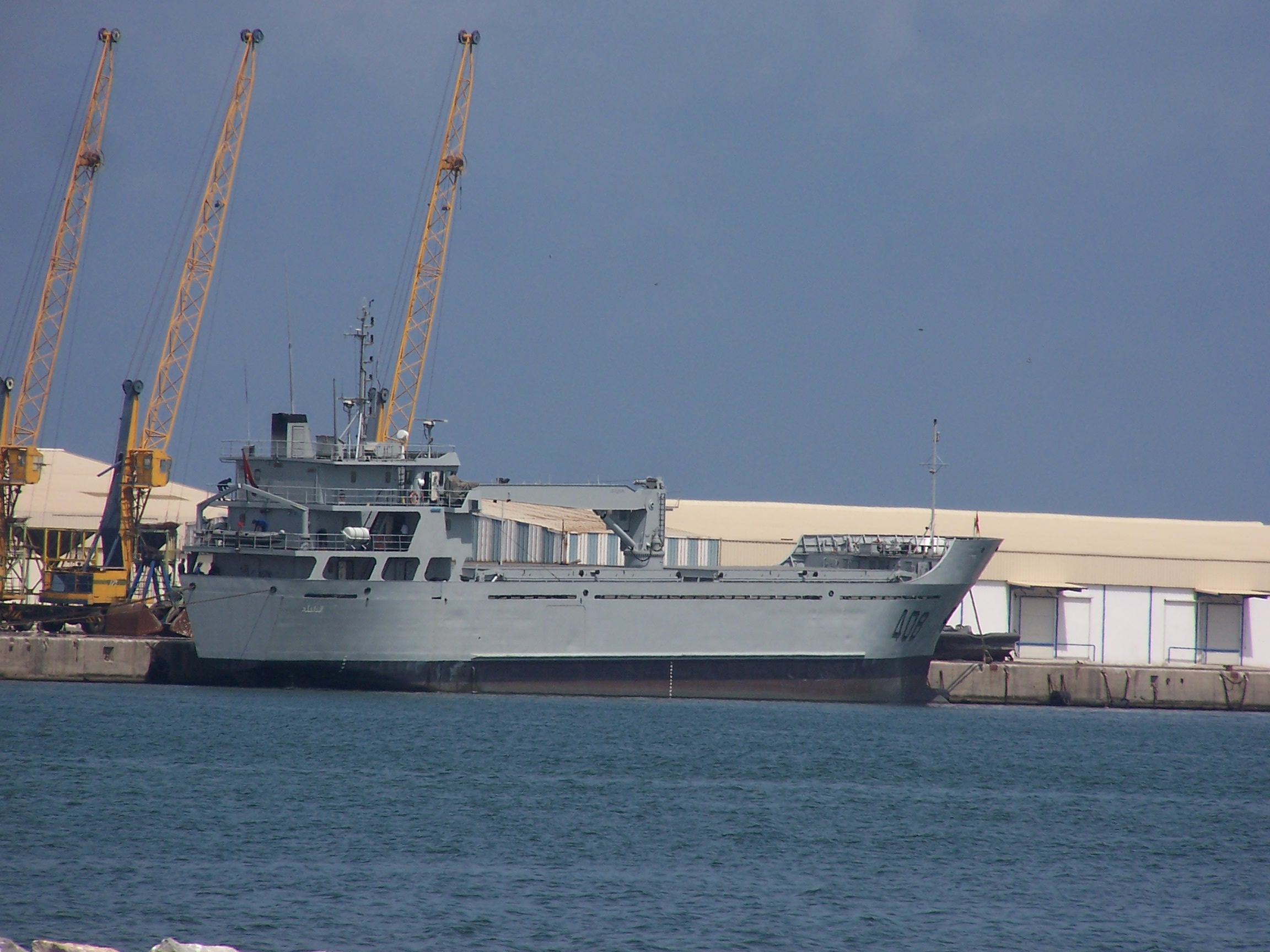 Buque logistico costero Ad Dakhla CLS 408 en Nador (Marruecos)